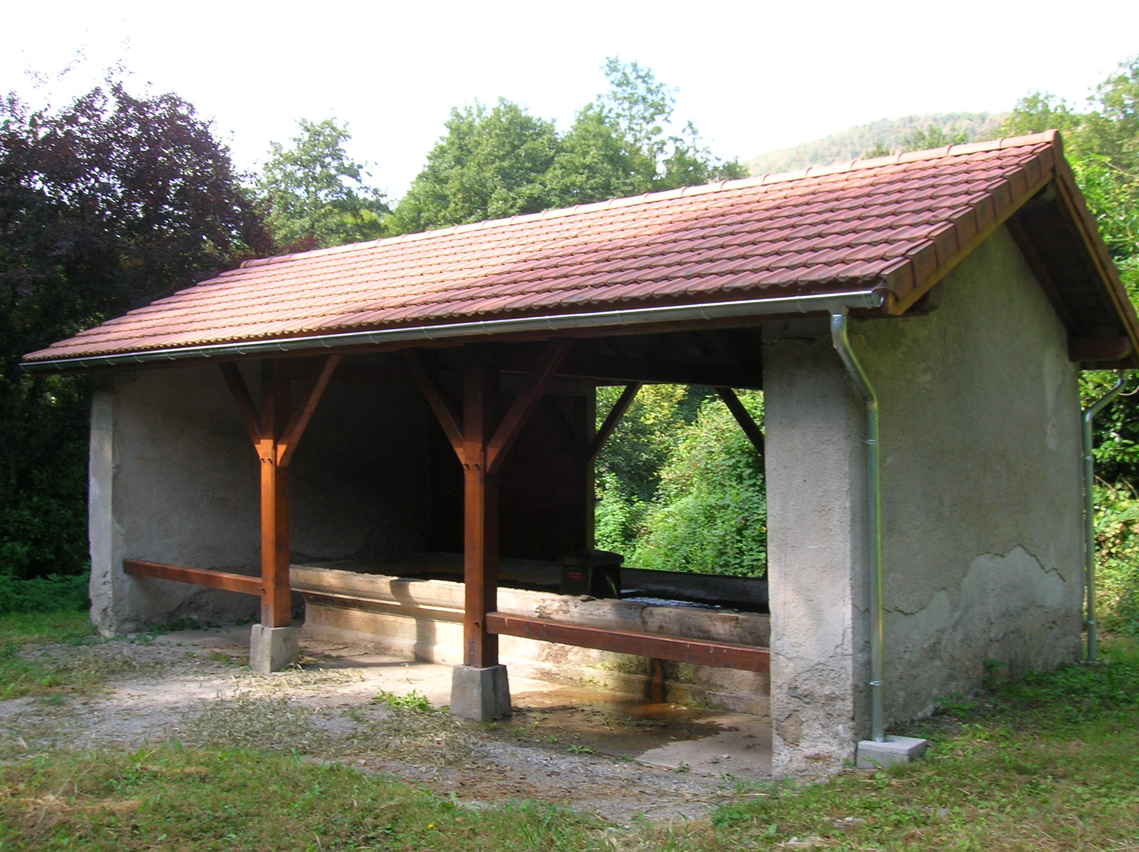 Lavoir du Gorgot. Vaulnaveys-le-Bas, Isère, AuRA, France.